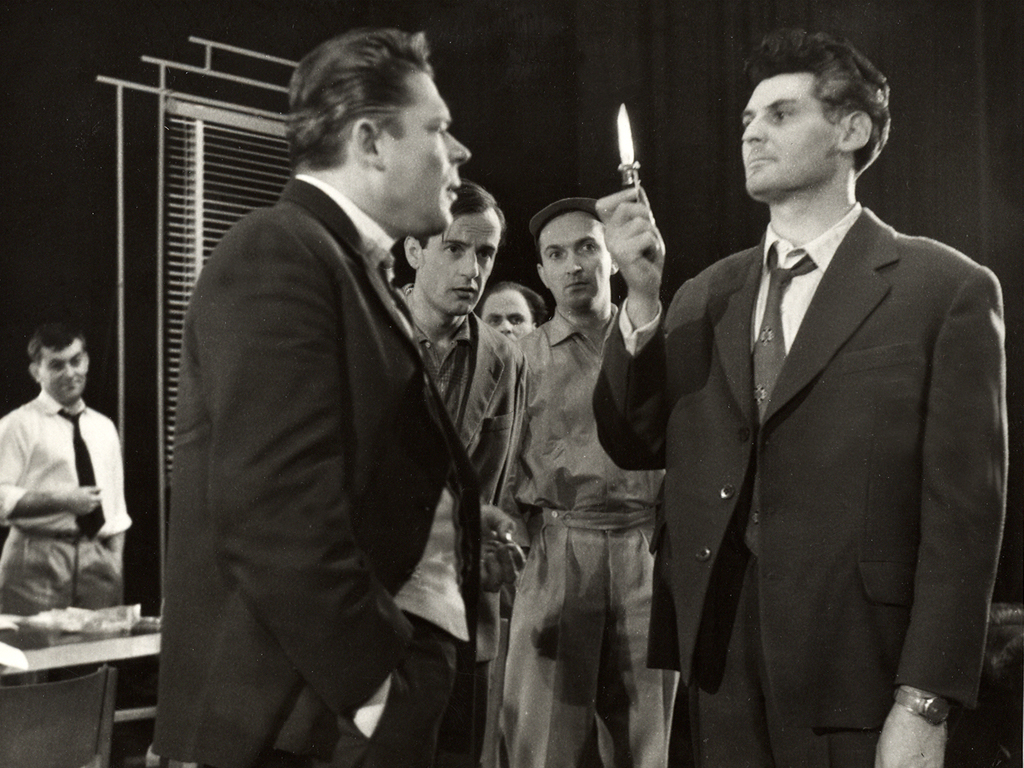 Horst Budjuhn, Reginald Rose, Dvanajst porotnikov, Slovensko ljudsko gledališče v Celju. Na fotografiji: v ospredju Janez Škof (Trmoglavi), Zlatko Šugman (Bojazlivi), Anton Petje (Strahopetec), Janez Eržen (Pravicoljubni).